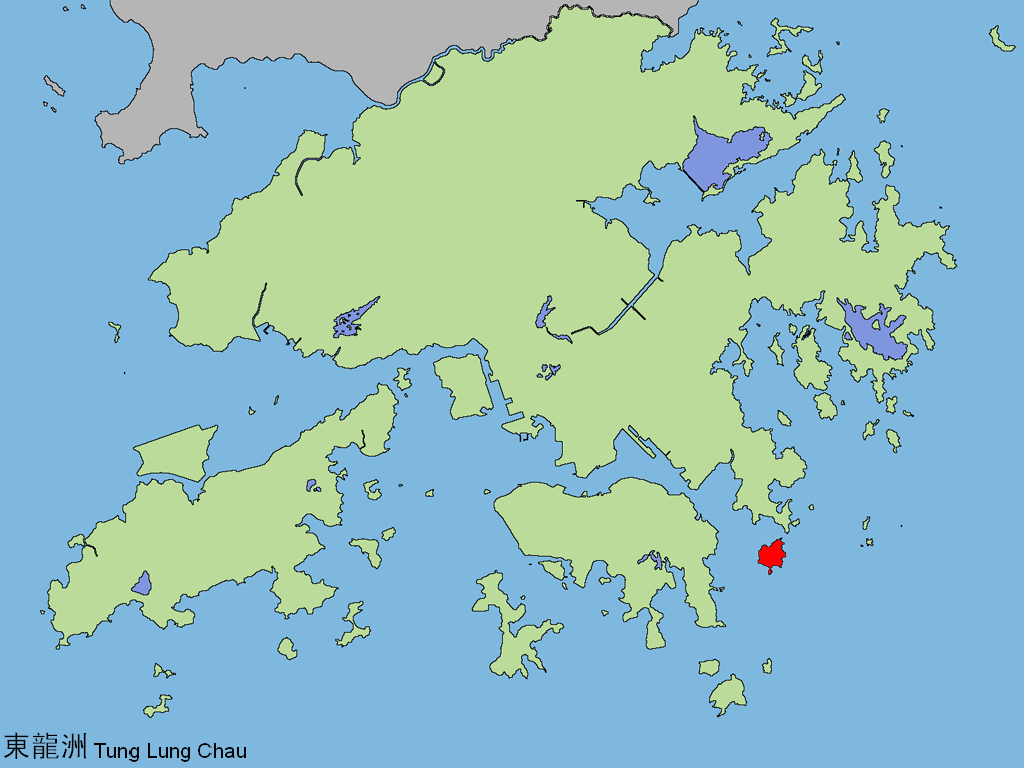 中文（香港）: 東龍洲。